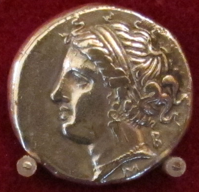 Napoli, Partenope, IV sec. ac.